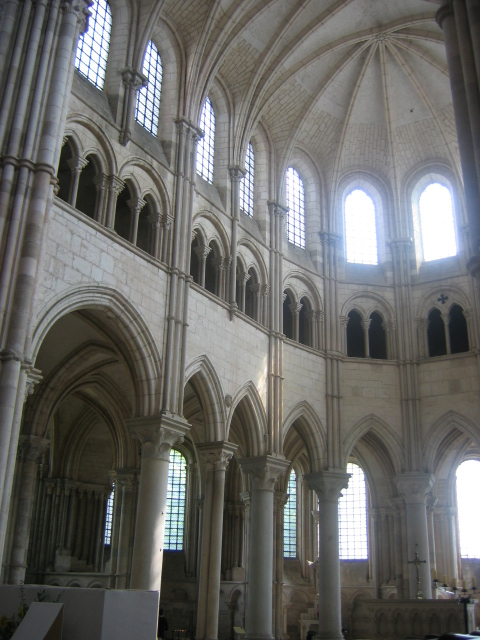 Abbatiale de Vézelay, Bourgogne, France : choeur